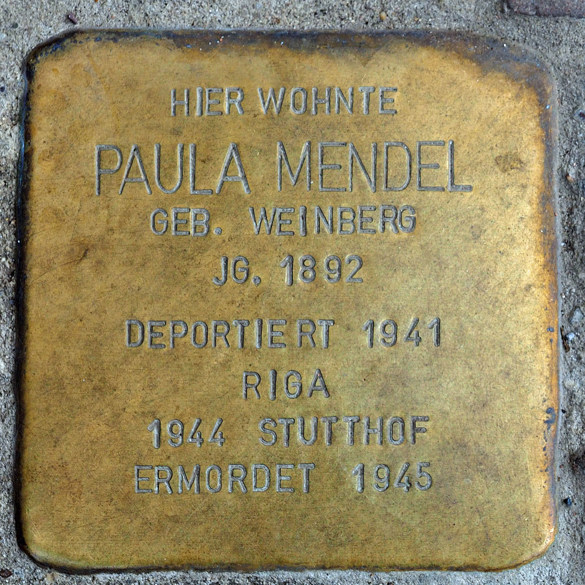 Stolpersteine in Kempen: Paula Mendel, Von-Loe-Straße 14